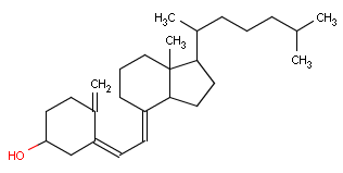 Structure de la vitamine D3